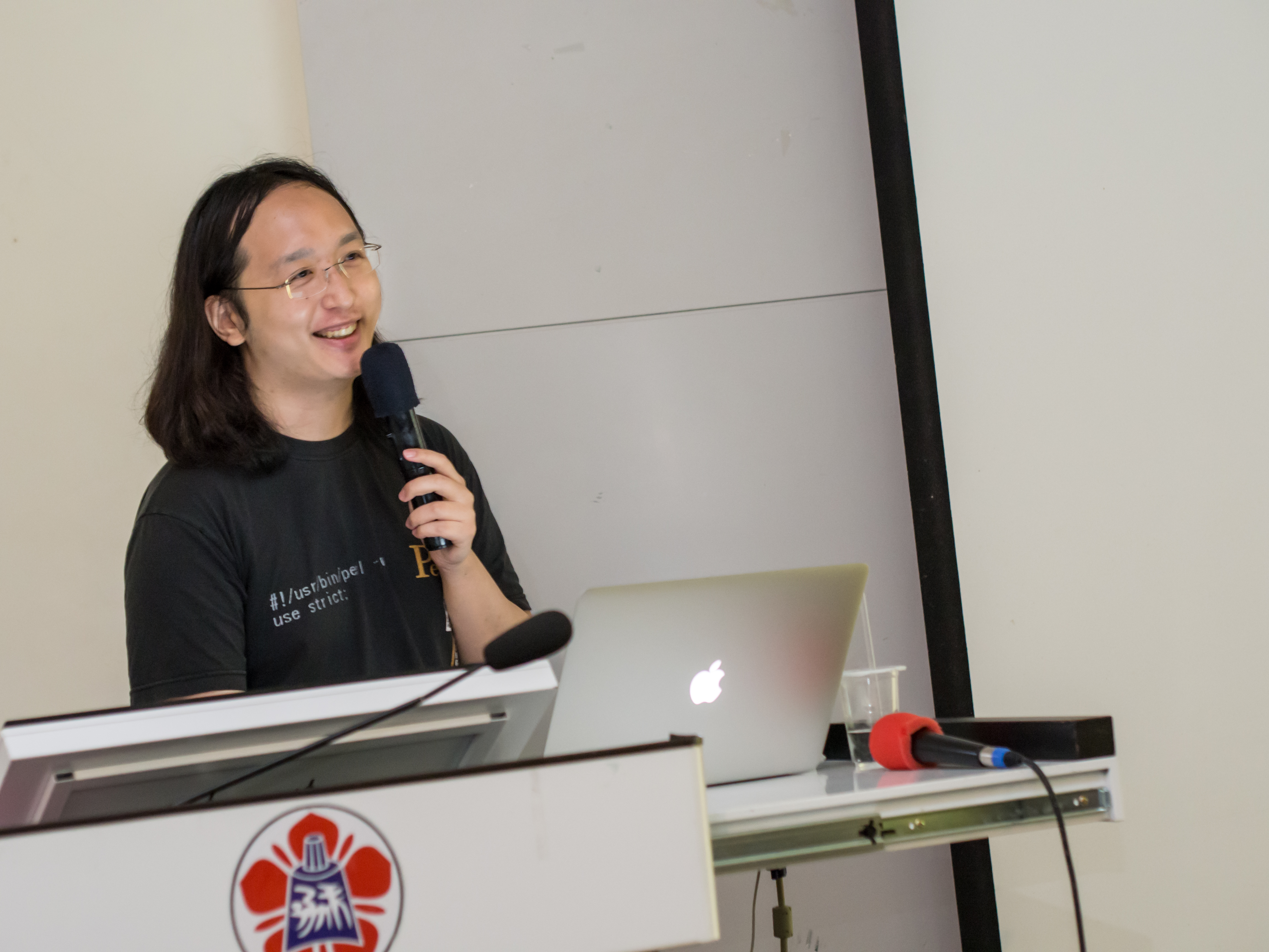 OLYMPUS DIGITAL CAMERA 20151013 成大開源月-唐鳳